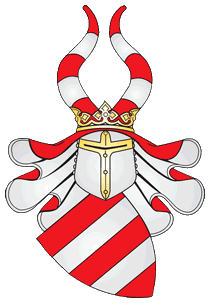 Wappen der Familie von Arnim